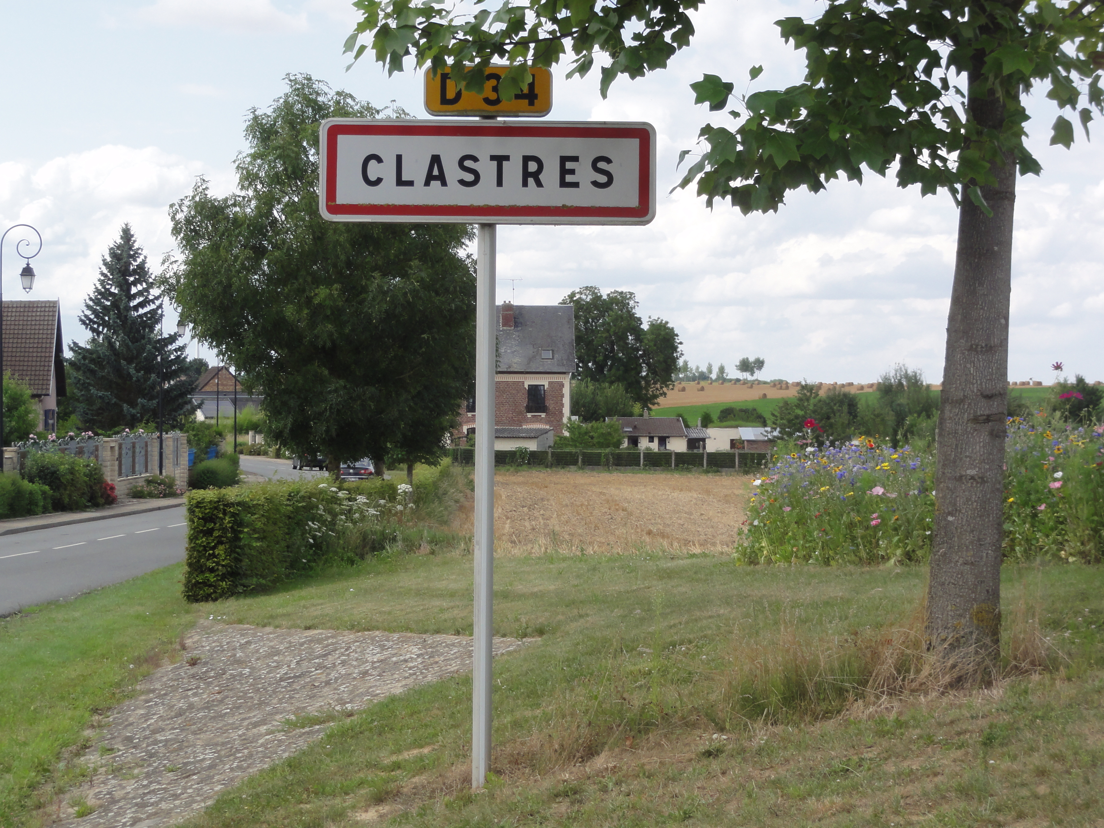 Clastres (Aisne) city limit sign